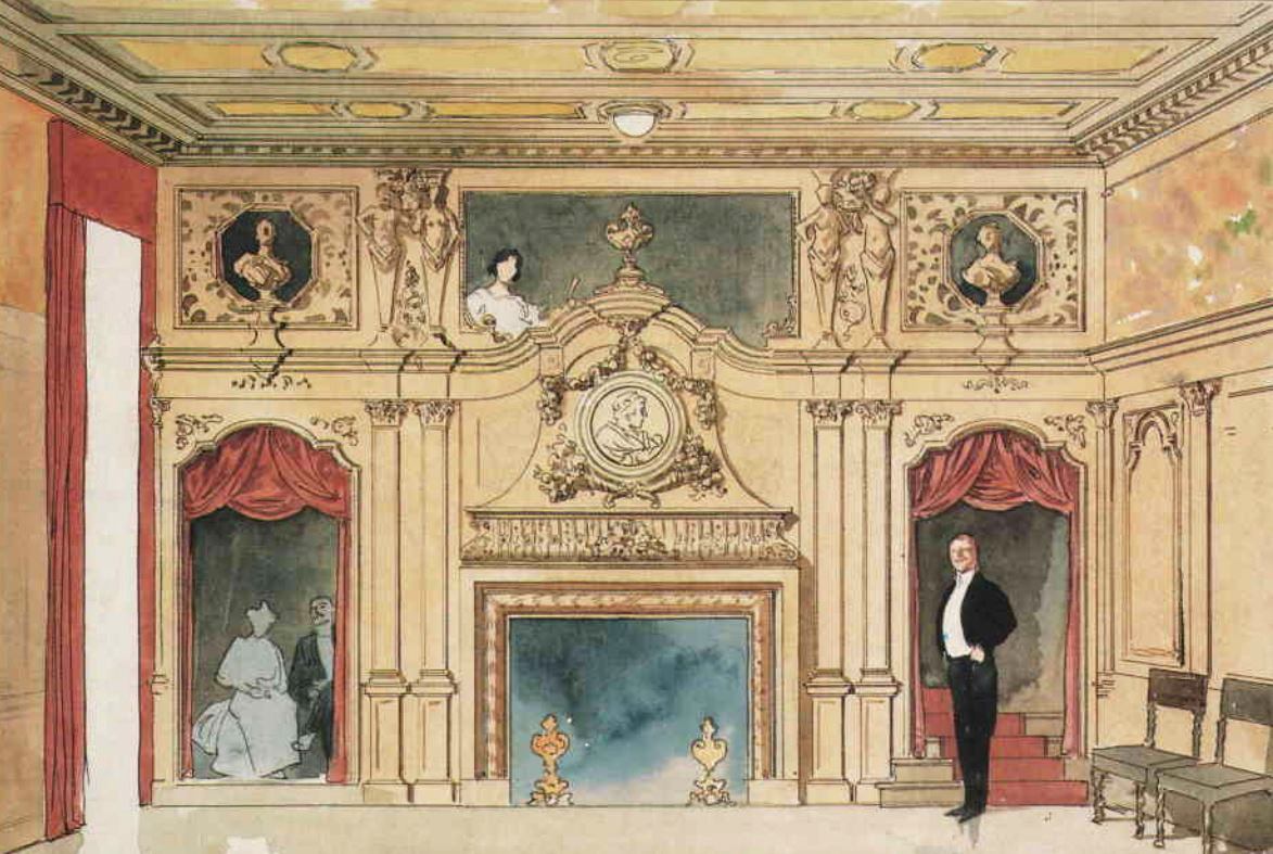 Vicke Andrén. van der Nootska palatset, matsalen på nedre botten. Skiss till utfört förslag. Akvarell 1904.